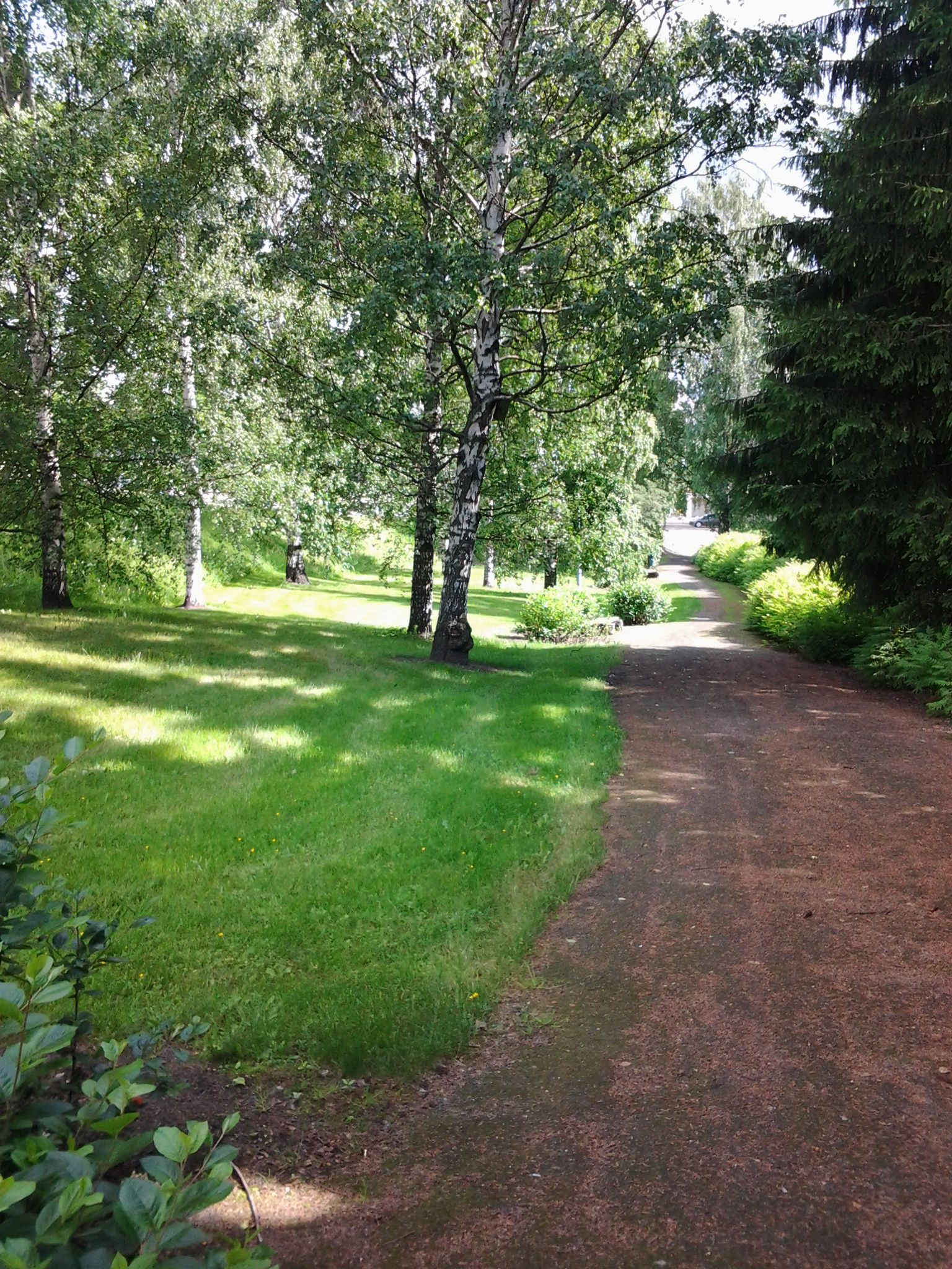 Puisto 2000-luvulla